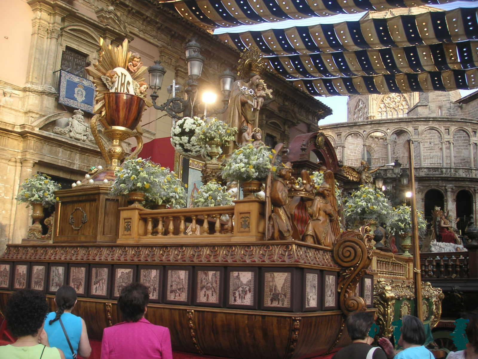 Rocas de la procesión del Corpus de Valencia, la más antigua del mundo.